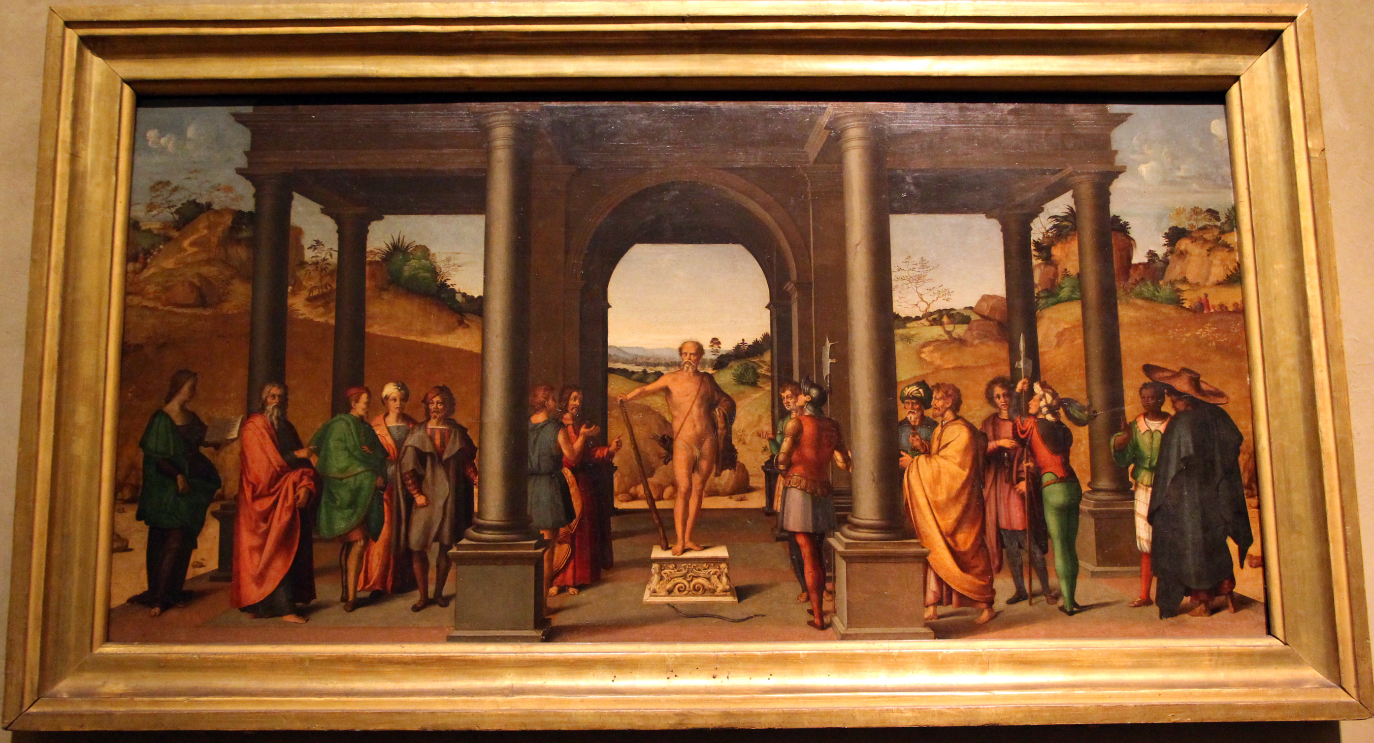 Museo della Casa fiorentina Antica - Palazzo Davanzati - MIBAC The making of this document was supported by Wikimedia CH. (Submit your project!) For all the files concerned, please see the category Supported by Wikimedia CH. This is a photo of a monument which is part of cultural heritage of Italy.